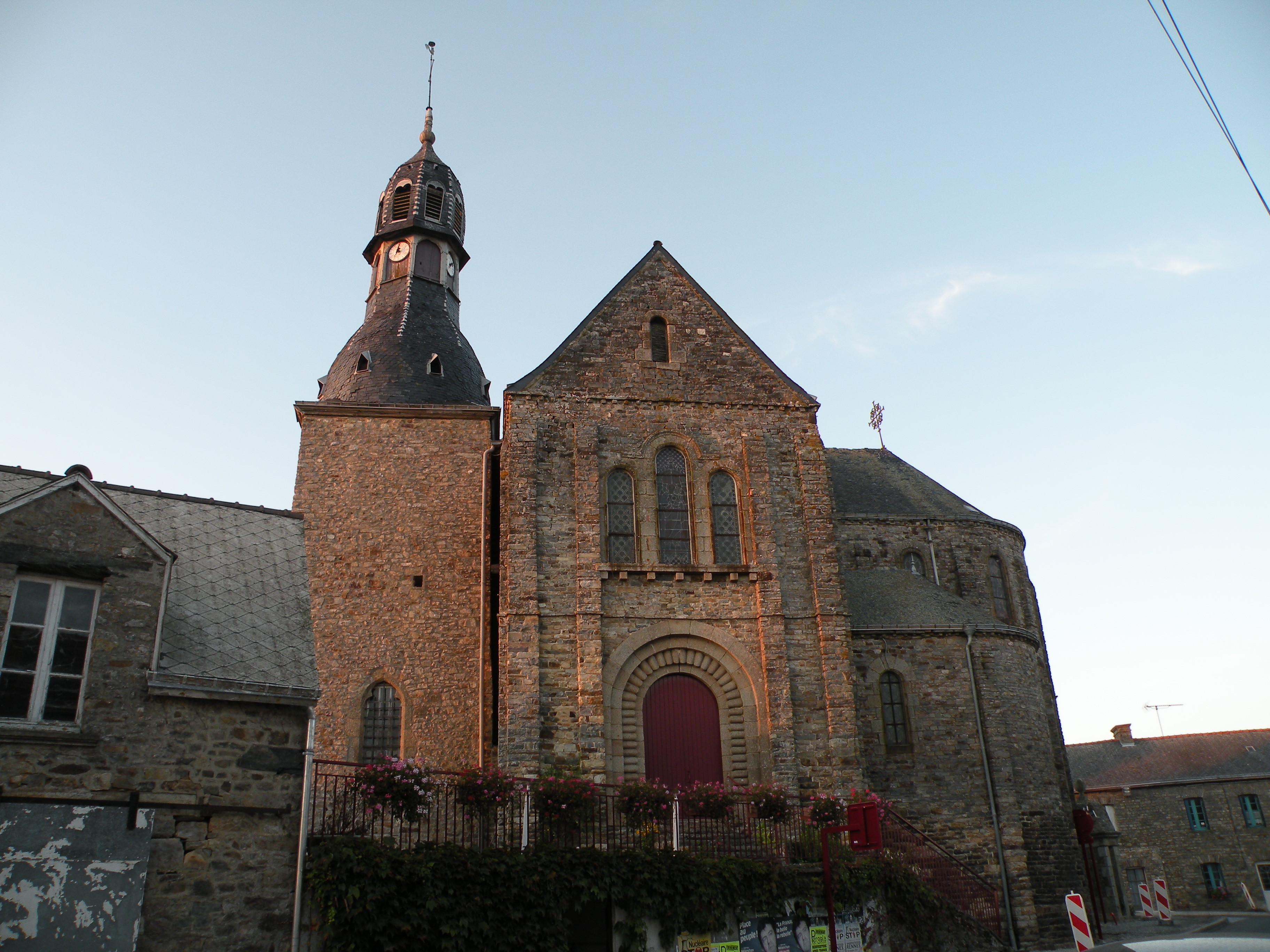 Église Saint-Jean-Baptiste de La Croixille : transept sud.